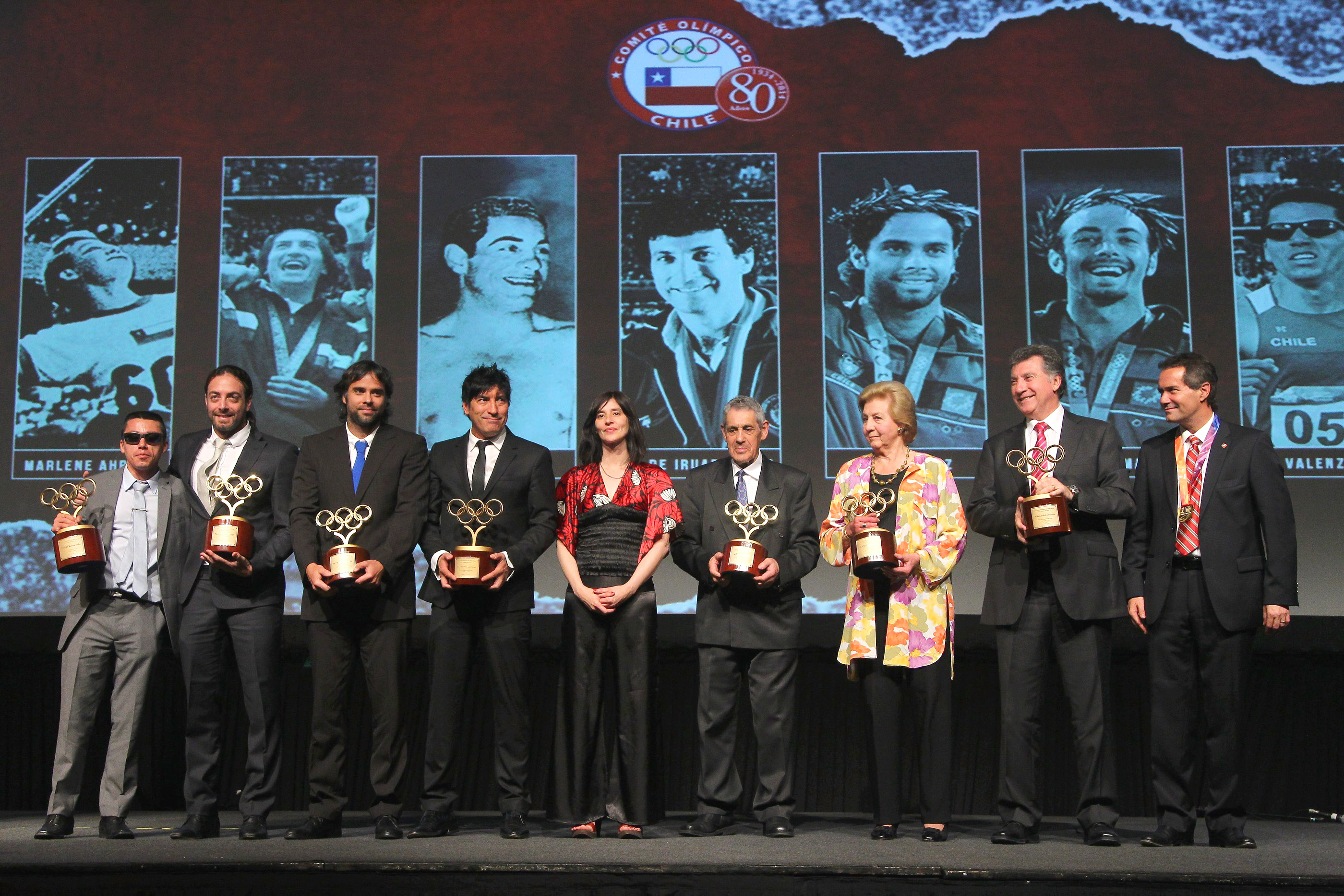 En el centro de Eventos Casapiedra el Comité Olímpico de Chile encabezado por su presidente Neven Ilic, realizó una gala de celebración de sus 80 años. A la ceremonia asistió la Ministra de Deportes Natalia Riffo, la Subsecretaria Nicole Sáez y el Director nacional del IND Ricardo Loyola. Santiago, Chile 20/11/2014 Foto: Max Montecinos/IND